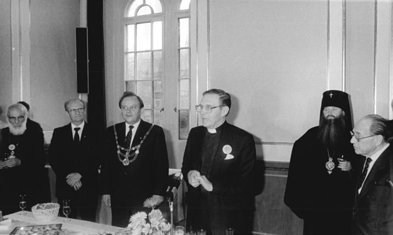 ADN-ZB Schindler 28.6.87 Berlin: Evangelischer Kirchentag Berlin 1987-Empfang- Der Vizepräsident der Konferenz Europäischer Kirchen Dean Dr. John Arnold (Mitte) sprach auf dem Empfang aus Anlaß des Evangelischen Kirchentagen im Roten Rathaus. Rechts: Klaus Gysi und 2.v.l. Erhard Krack.